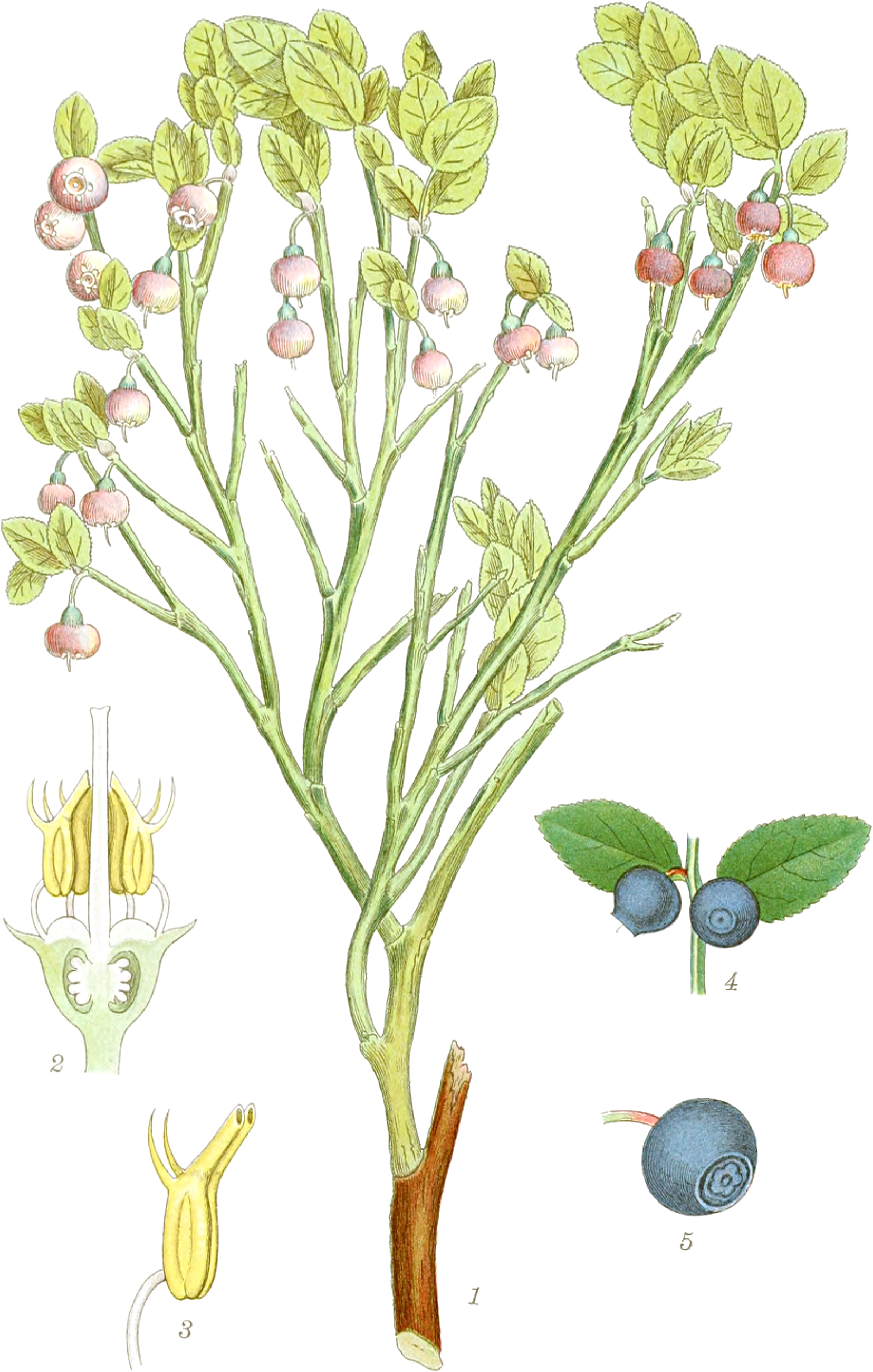 Mentz, A.; Ostenfeld, C. H.: Bilder der Nordflora. Band 1, 1917ff.Heidelbeere. Vaccinium myrtillusTaf. 141. Abb. 1. Ein Reis einer Blaubeere mit Blumen. Abb. 2. Längsschnitt der Blume nach Entfernung der Krone (6/1). Abb. 3. Staubbeutel (10/1). Abb. 4. Zweig mit zwei reifen Beeren. Abb. 5. Reife Beere (3/2).